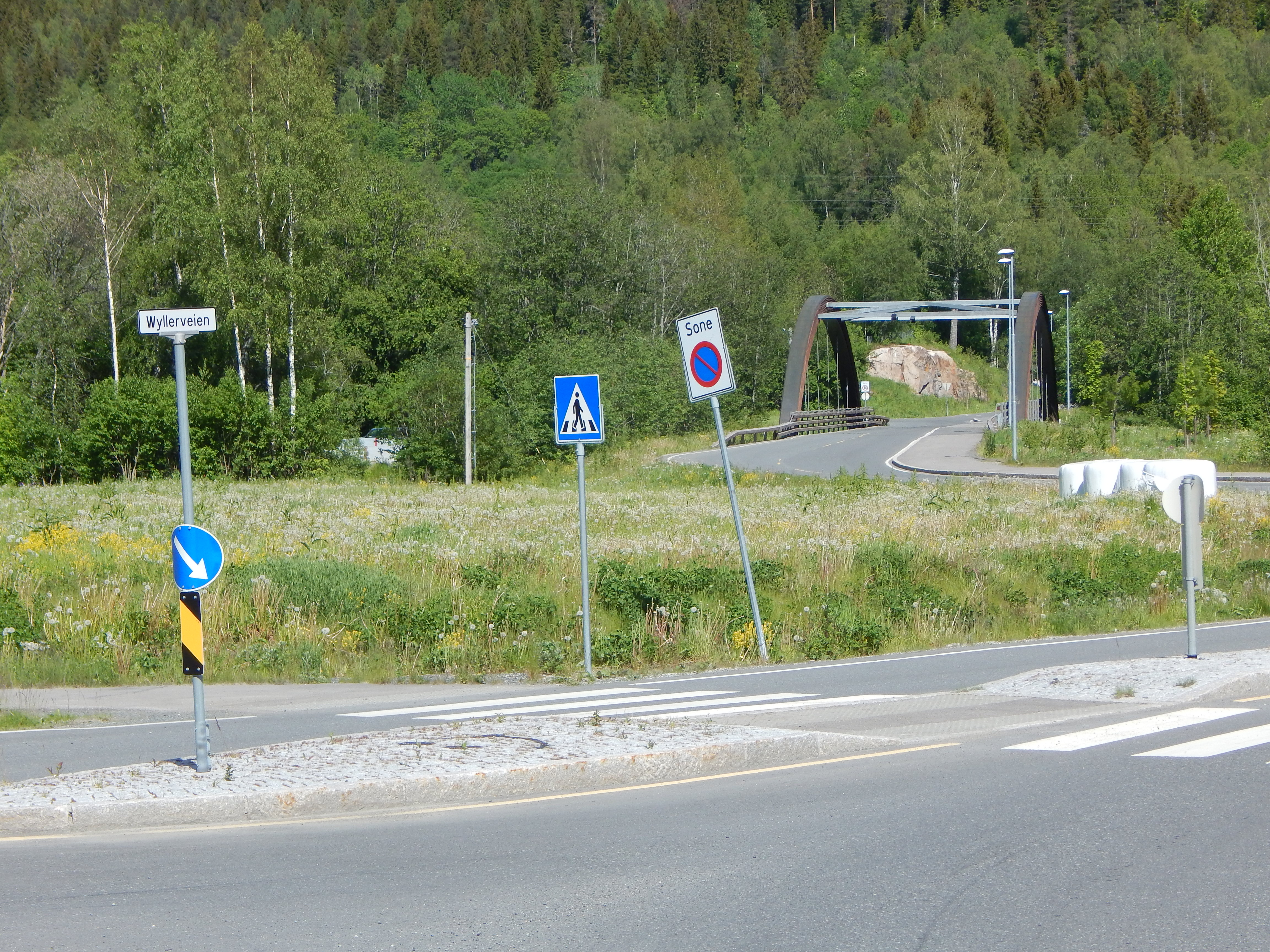 Wyllerveien